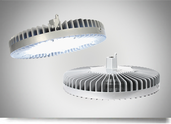 LED Hallenleuchte